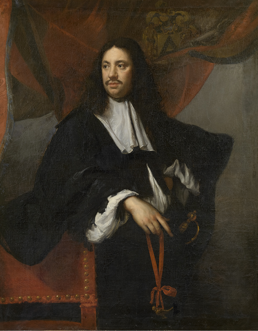 Portret van Jan-Filips van Boonem, deken van het Brugse Sint-Jorisgilde (Jacob I van Oost, 1665); collection: Musea Brugge - Groeningemuseum